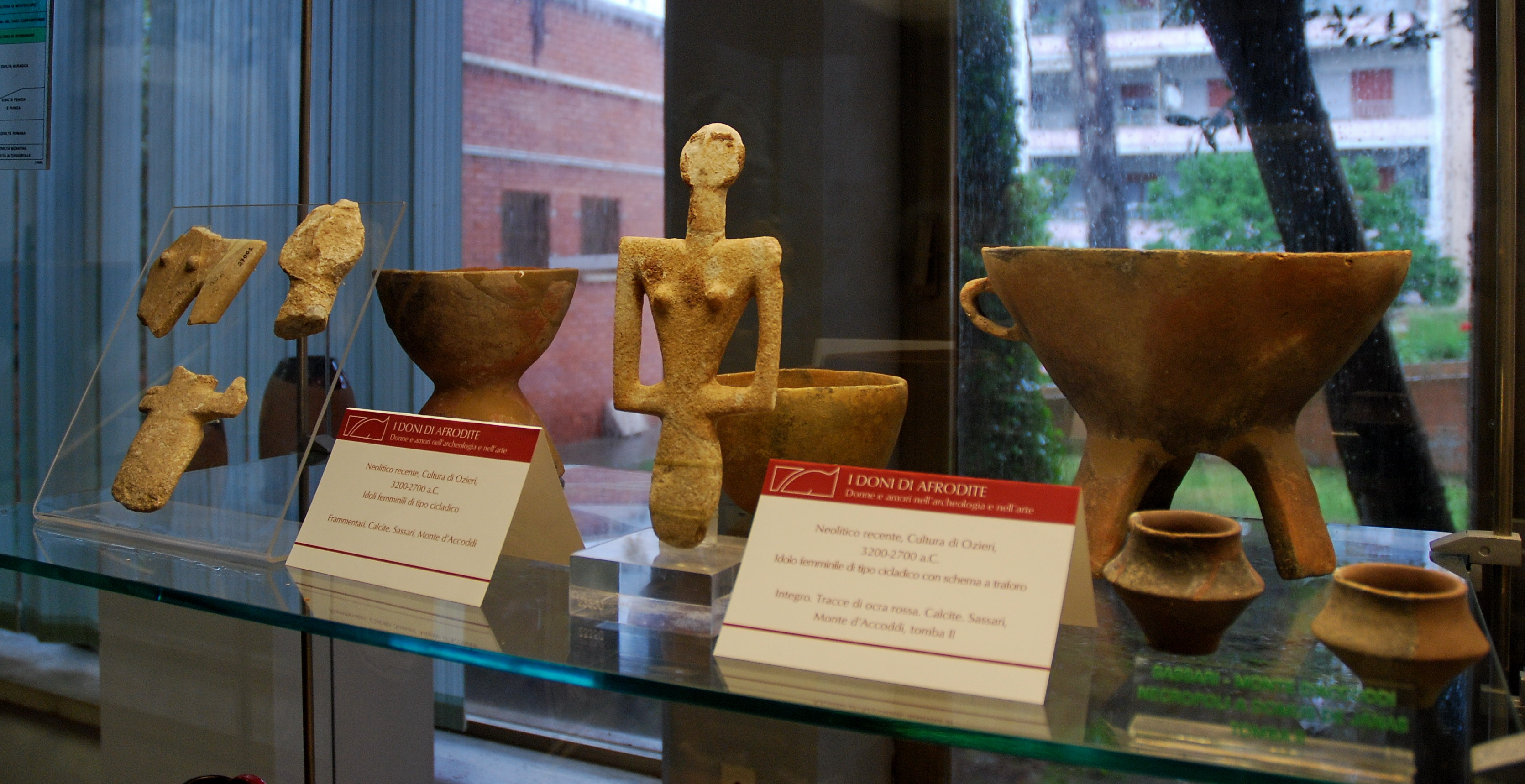 Museo archeologico nazionale G.A. Sanna - MIBAC This is a photo of a monument which is part of cultural heritage of Italy.